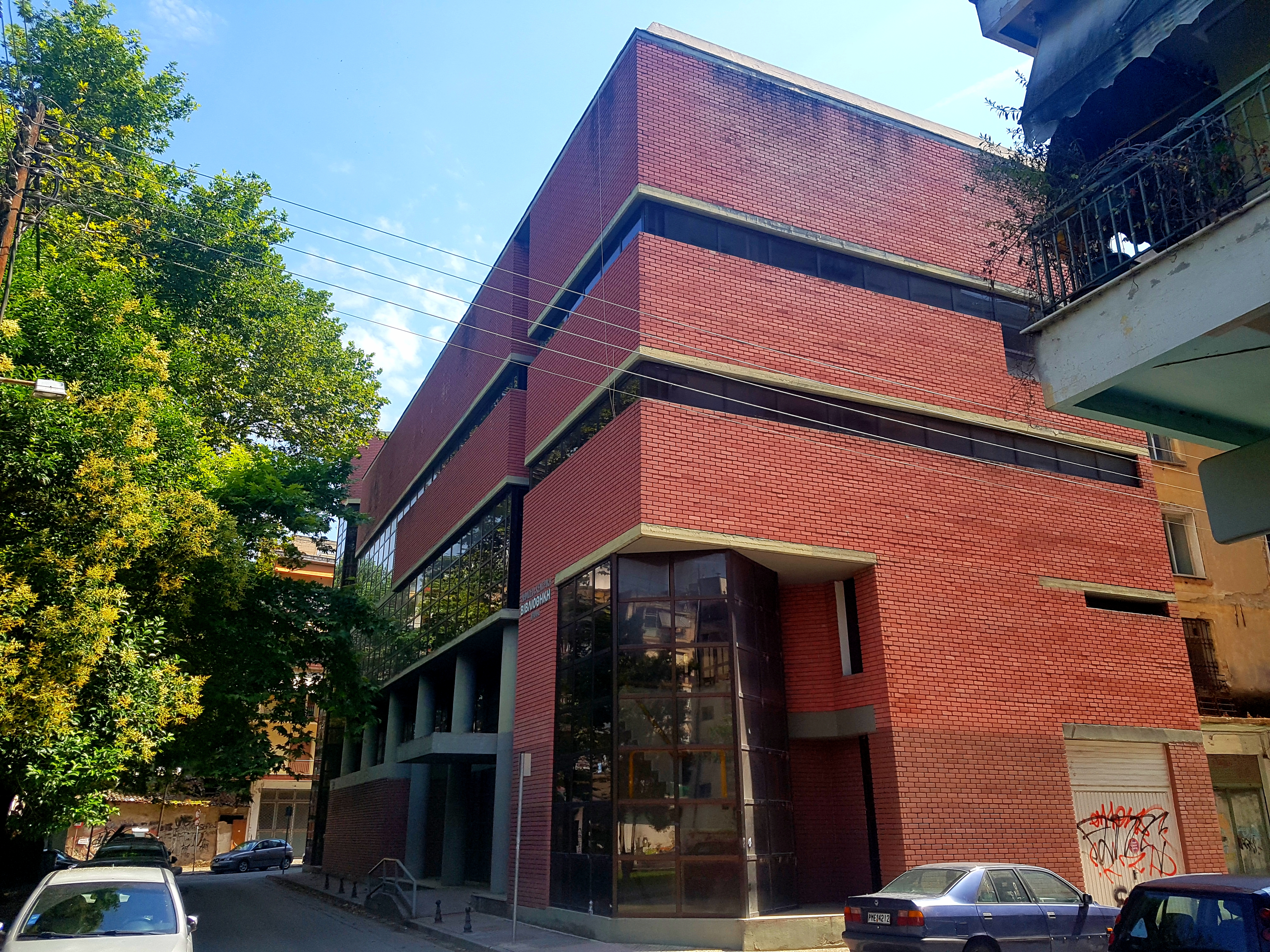 Η βιβλιοθήκη της Δράμας